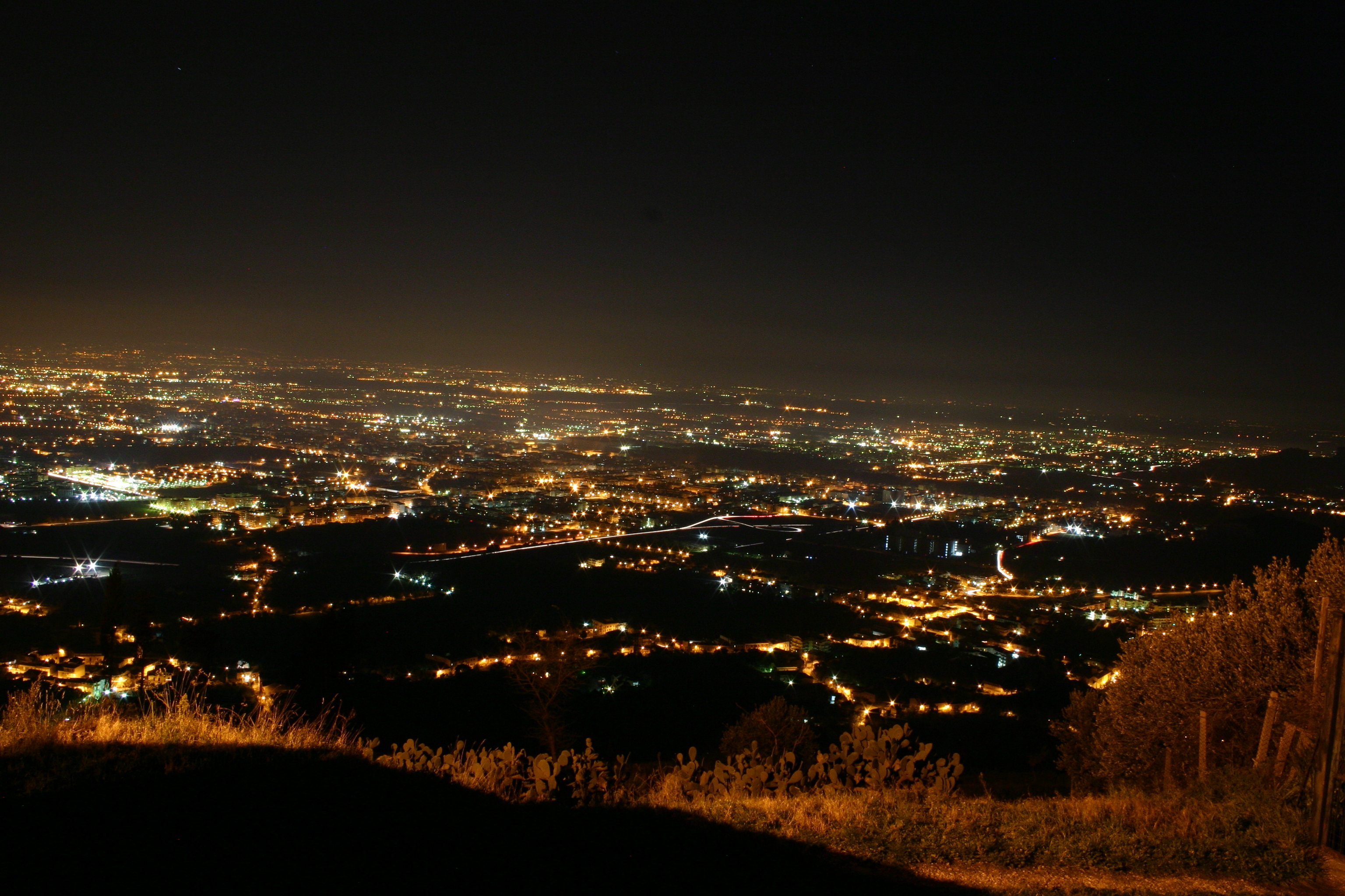 davidhc